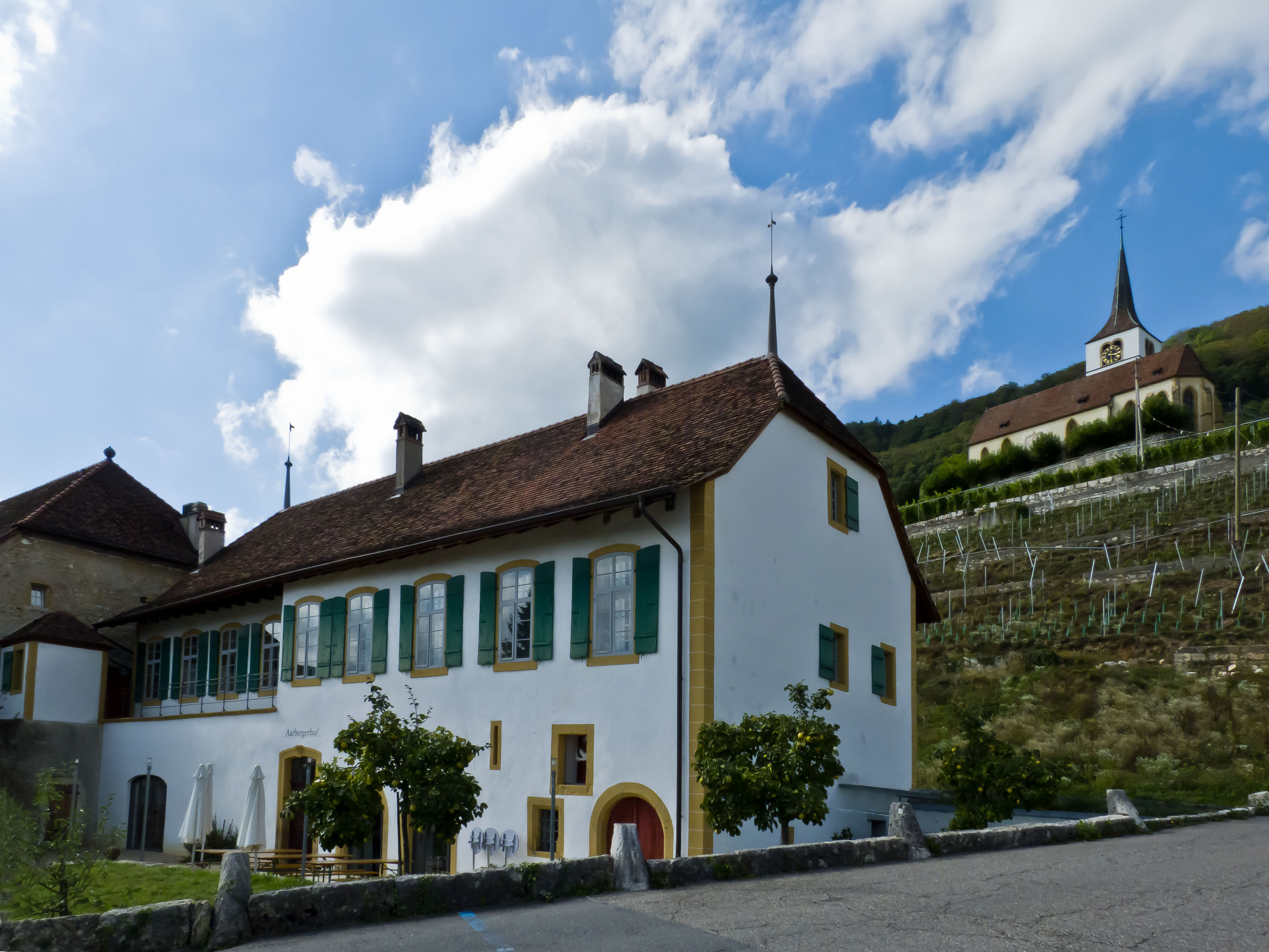 Ligerz, Aarbergerhaus diagonal mit Sicht auf Kirche